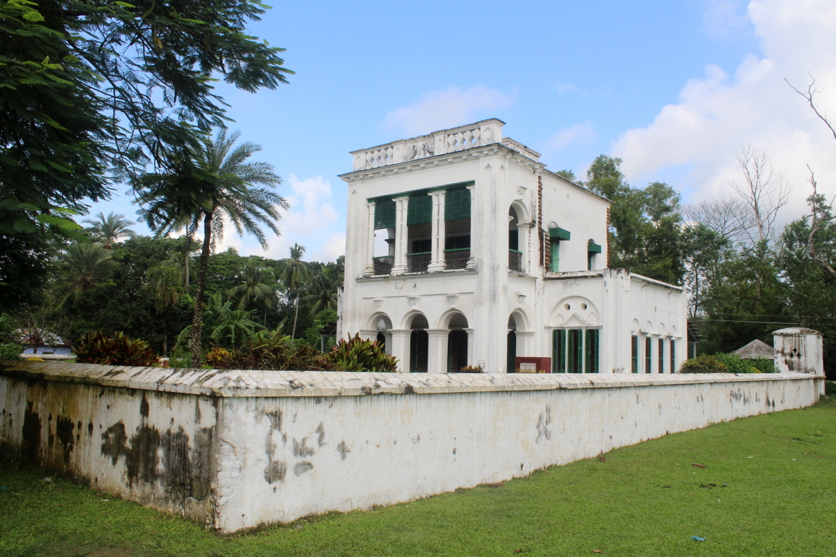 দক্ষিণডিহি রবীন্দ্র কমপ্লেক্স। ফুলতলা, খুলনা। দৃশ্যঃ বাইরে থেকে।